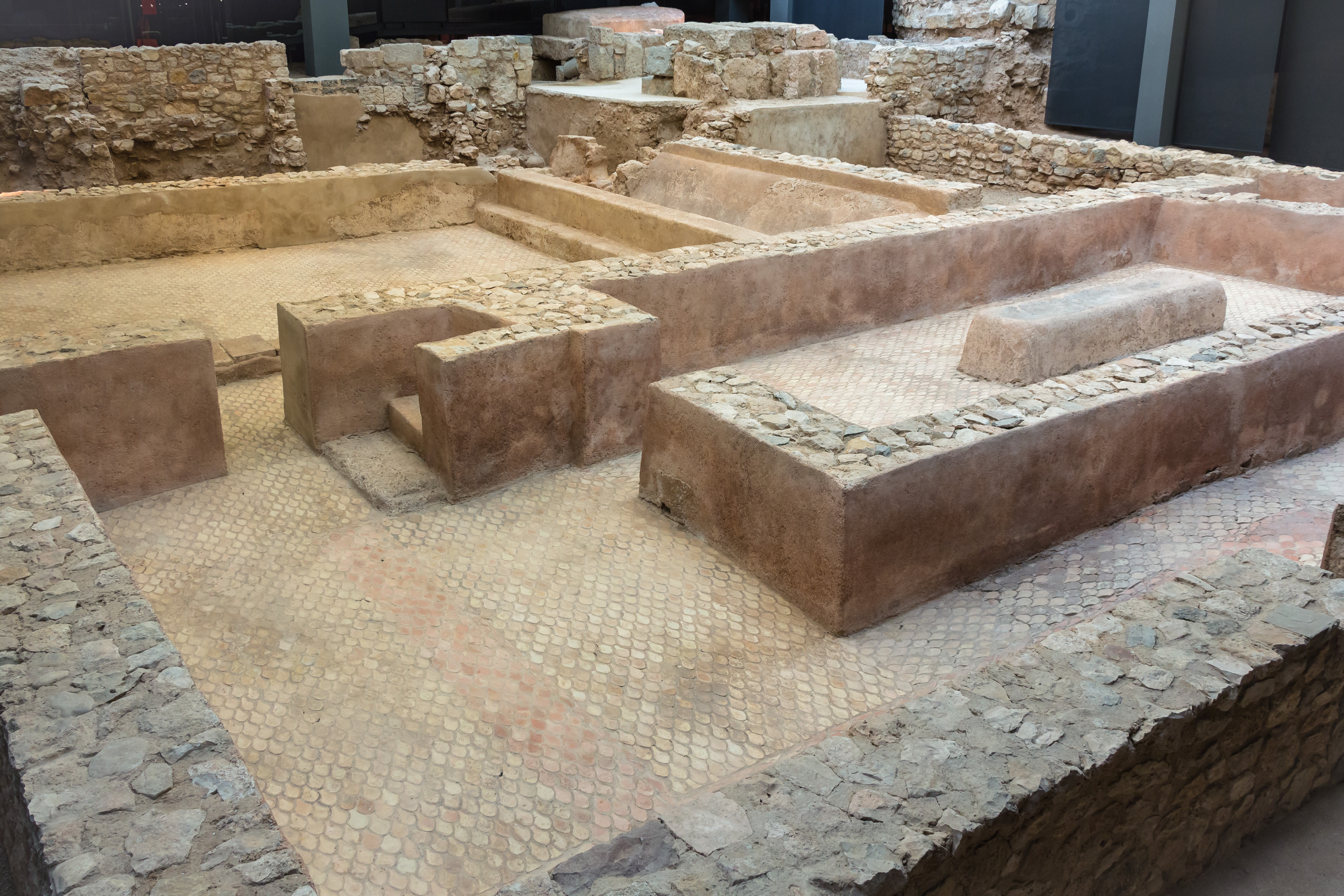 Restos de las termas romanas que pueden verse en el Centro Arqueológico de L'Almoina, en Valencia